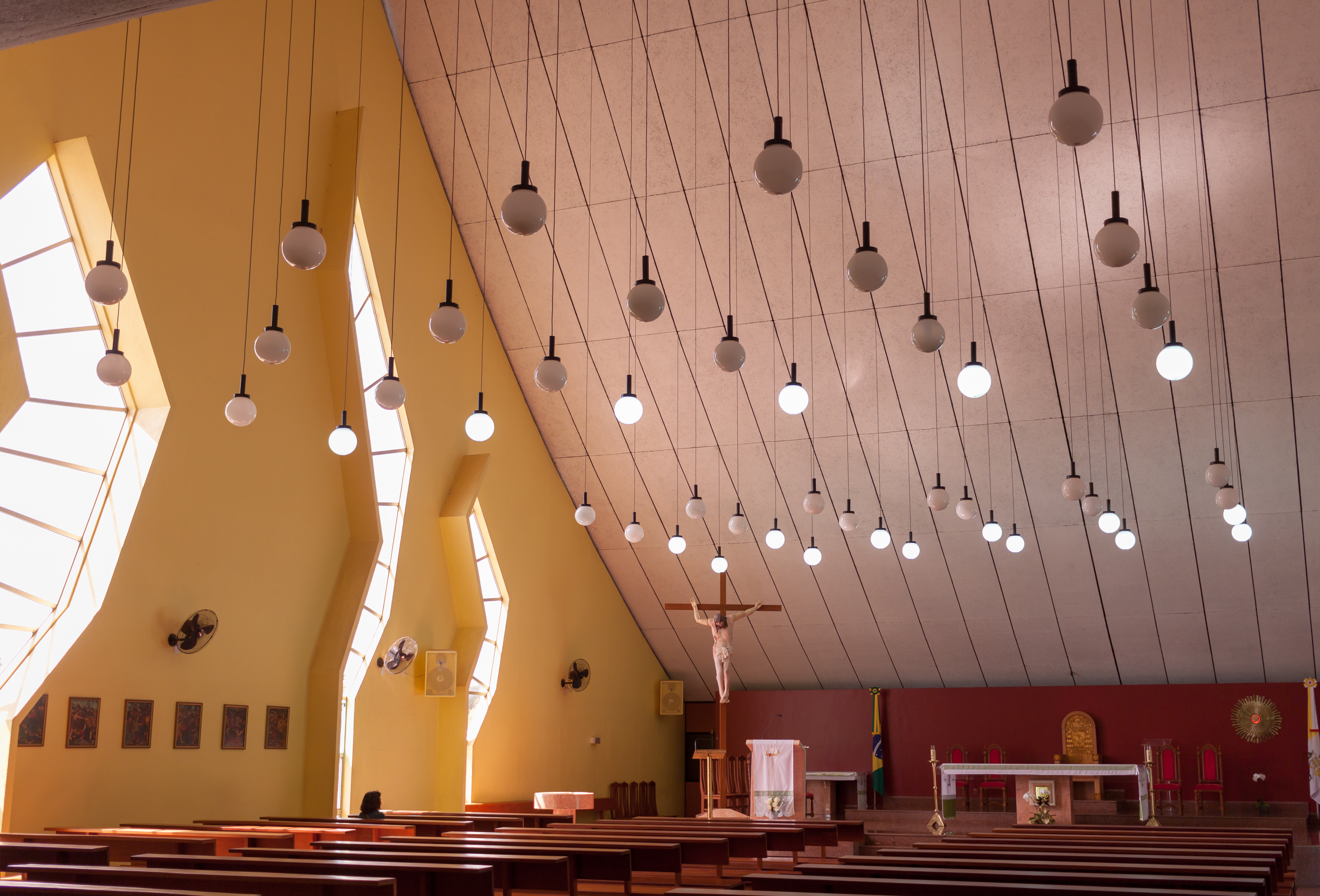 Catedral Militar Rainha da Paz